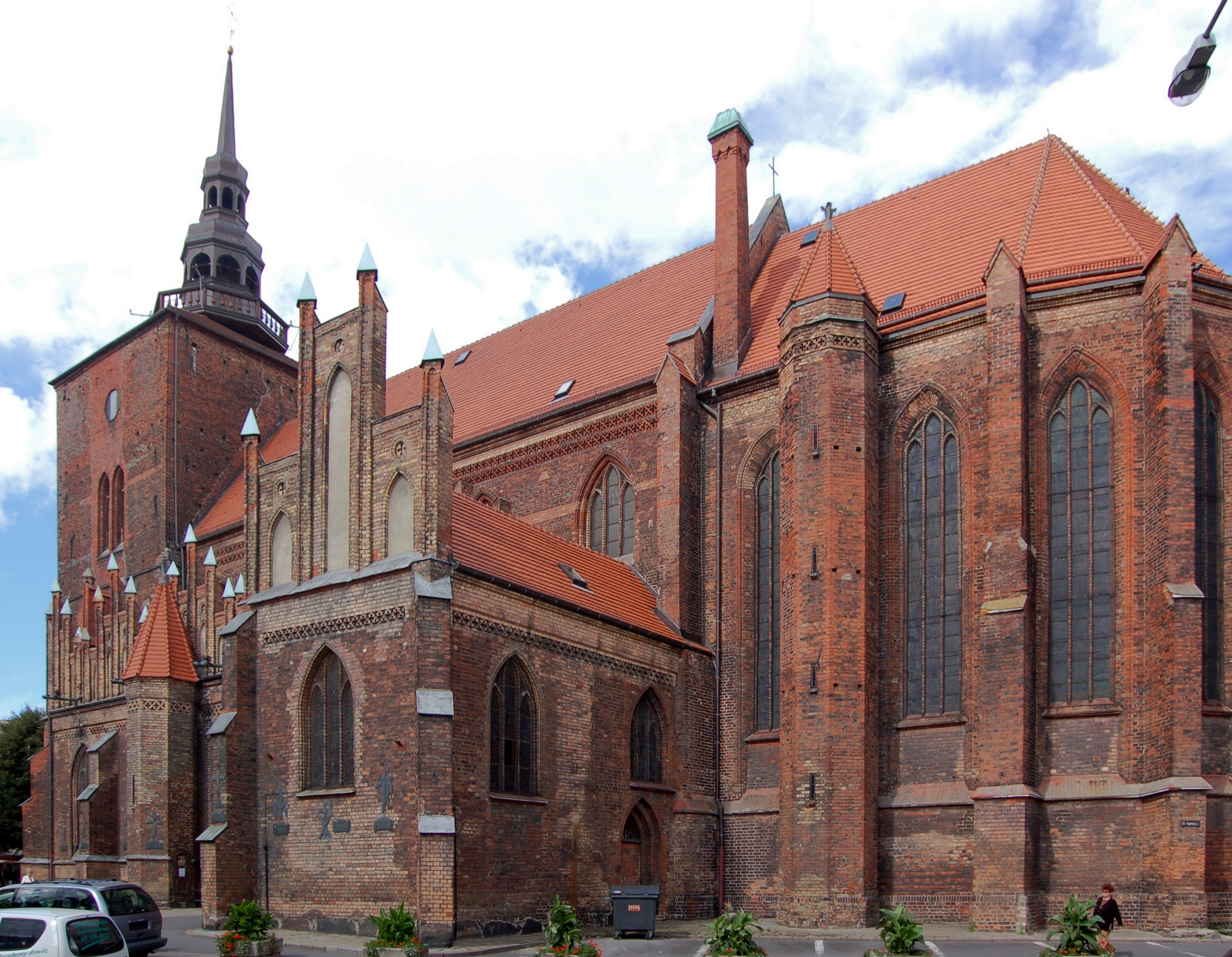 Słupsk, ul. Łukasiewicza 7 - rzymskokatolicki kościół parafialny pw. NMP Królowej Różańca Świętego, 2 poł. XIV, 1858-1860, 1958